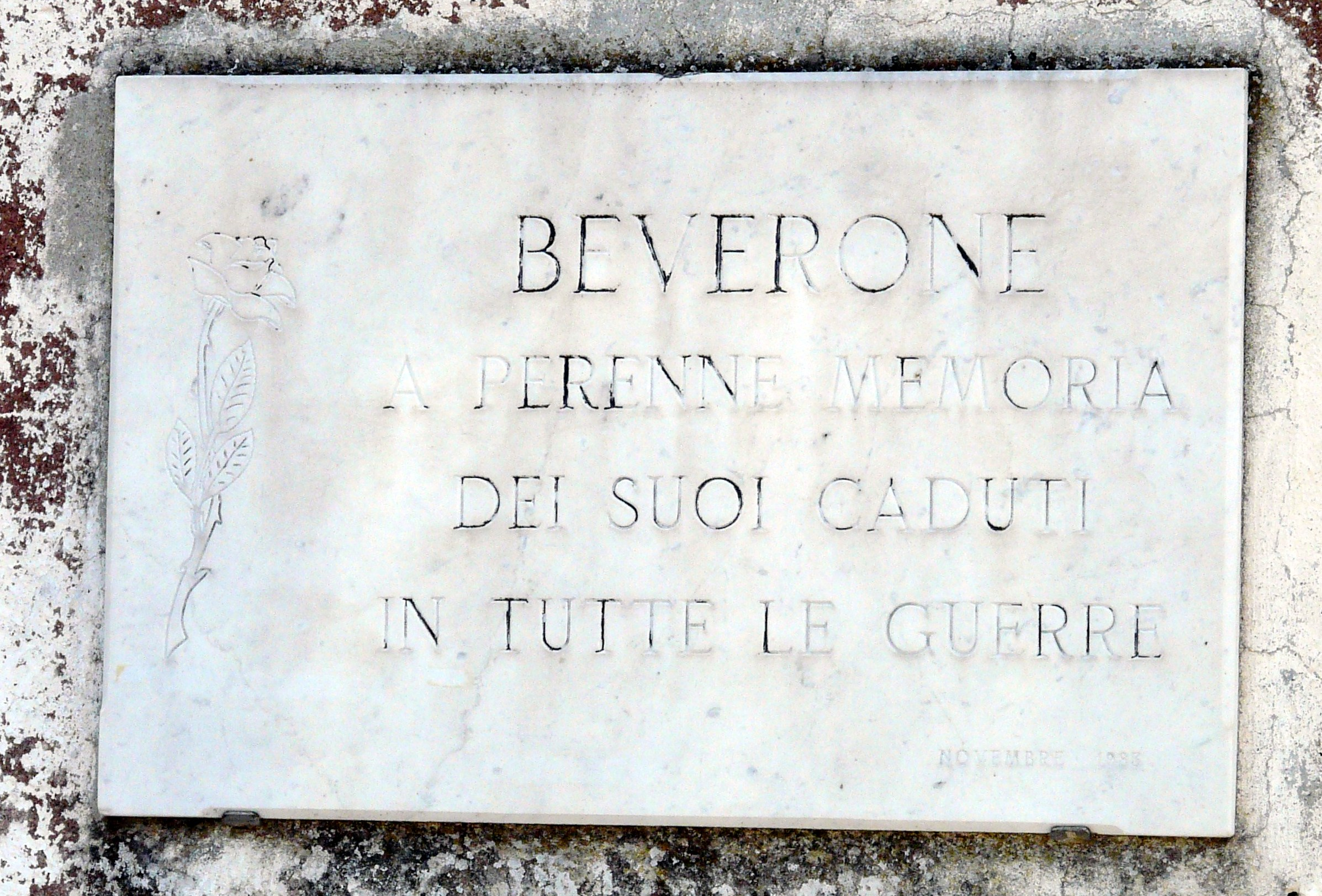 Targa ai caduti di Beverone, Rocchetta di Vara, Liguria, Italia